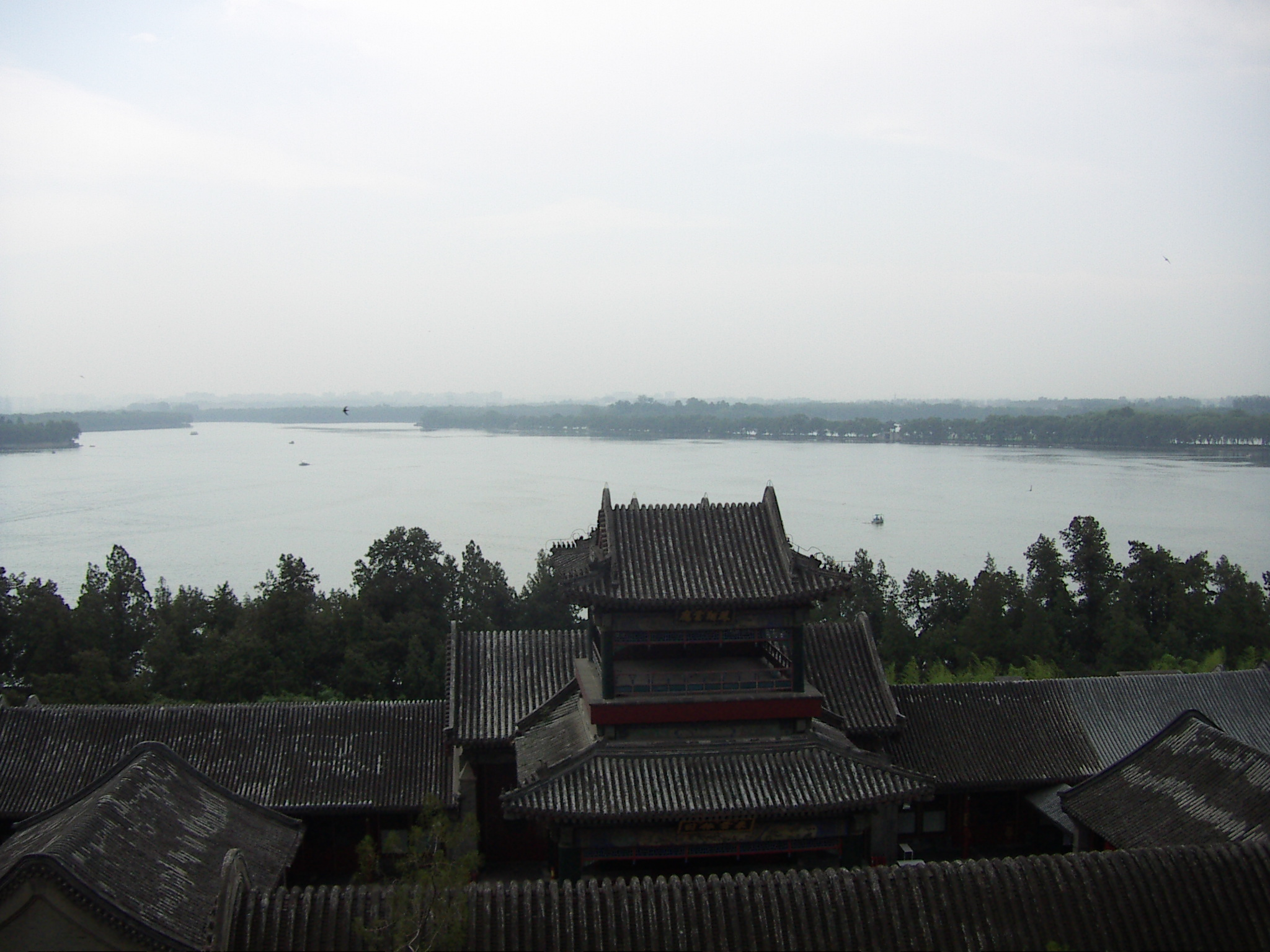 Kunmingsjön i sommarpalatset i Peking (Kina)